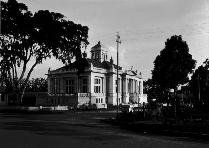 Foto. Kantoorgebouw van de Javasche Bank in Bandoeng.